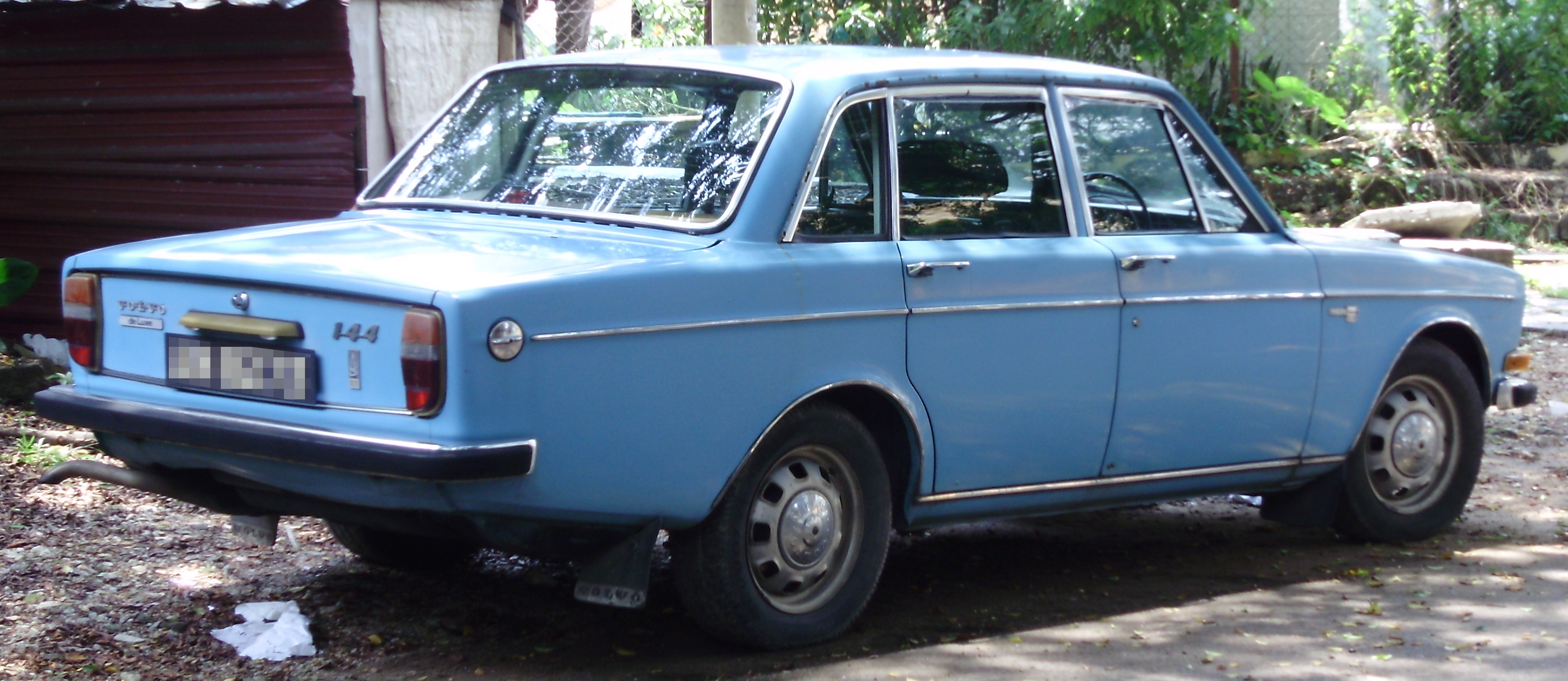 Rear quarter view of a Volvo 144 (de Luxe) in Pudu, Kuala Lumpur, Malaysia.